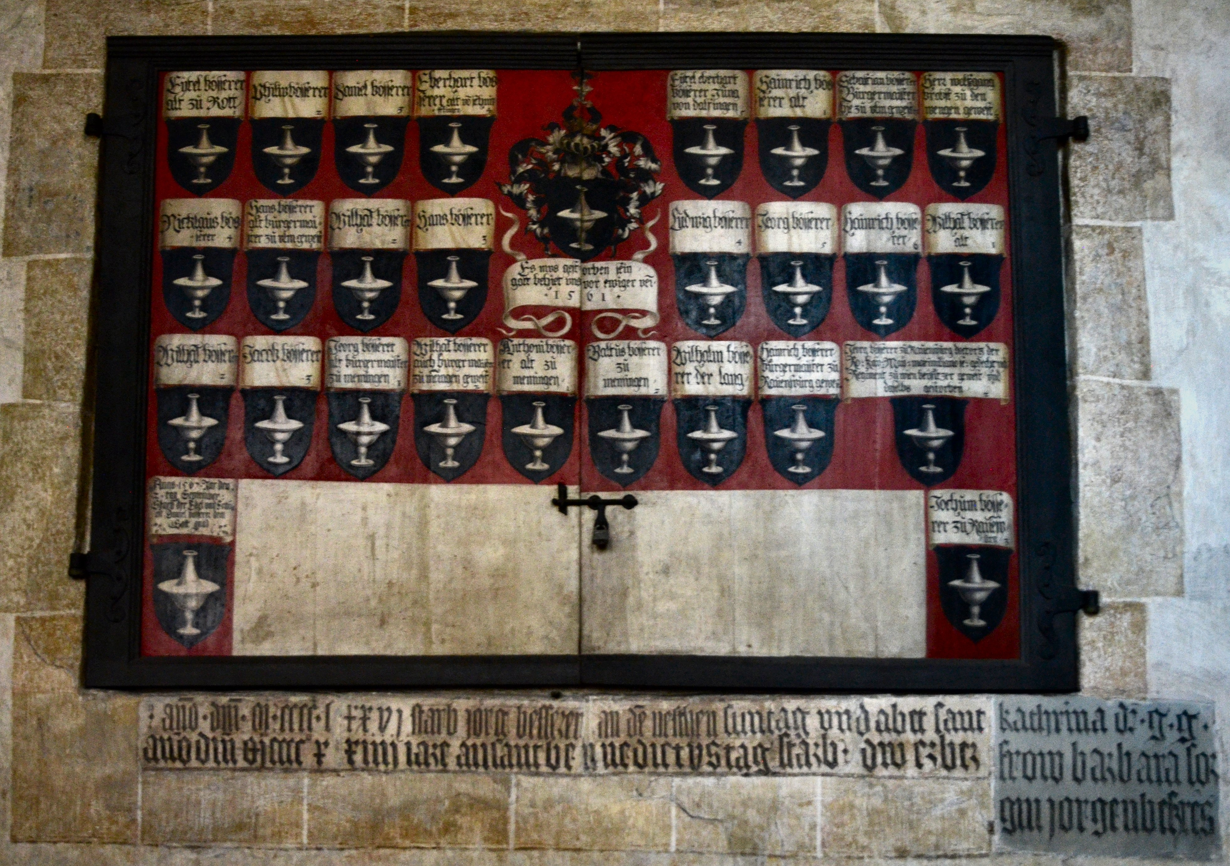 Ulmer Münster: Epitaphe in der Bessererkapelle